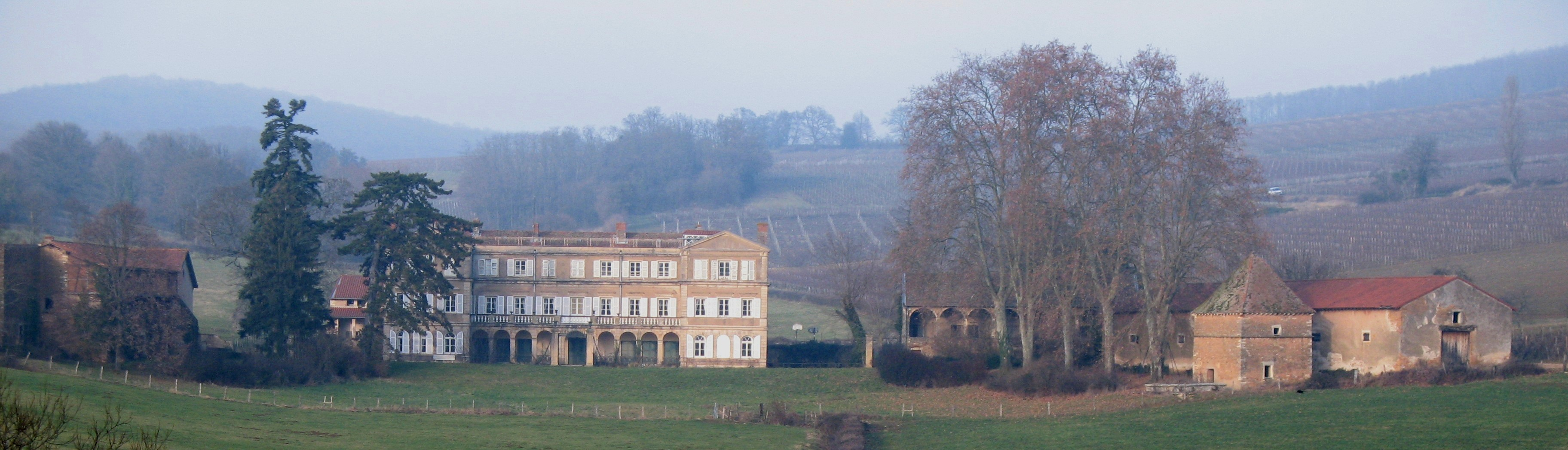 château de Vaux-sous-Targe - Péronne (Saône-et-Loire)